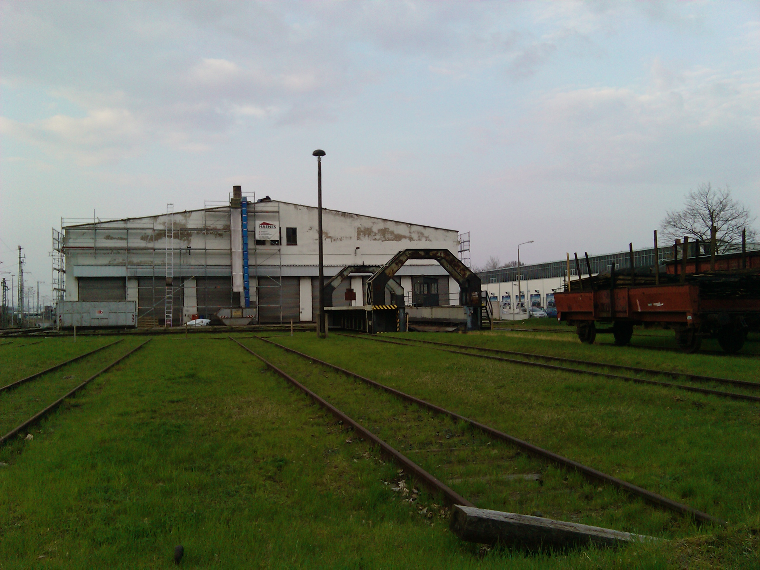 Ehemalige Lokomotivbetriebswerkstatt des Bahnbetriebswerks Dresden-Altstadt mit offenem Schiebebühnenfeld. Die Werkstatt wird heute als Fahrzeugdepot des Verkehrsmuseums Dresden genutzt.